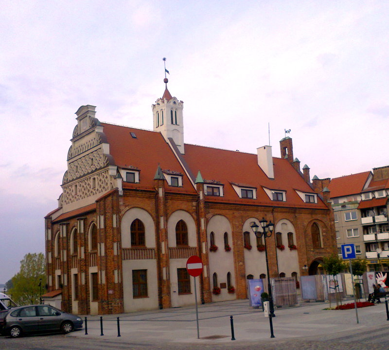 Kamień Pomorski, ratusz, XIV